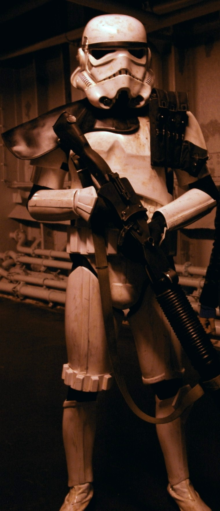 Gdańsk, noc muzeów.